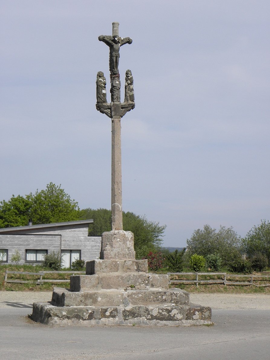 Calvaire de la chapelle de Christ en Guimaëc (29).